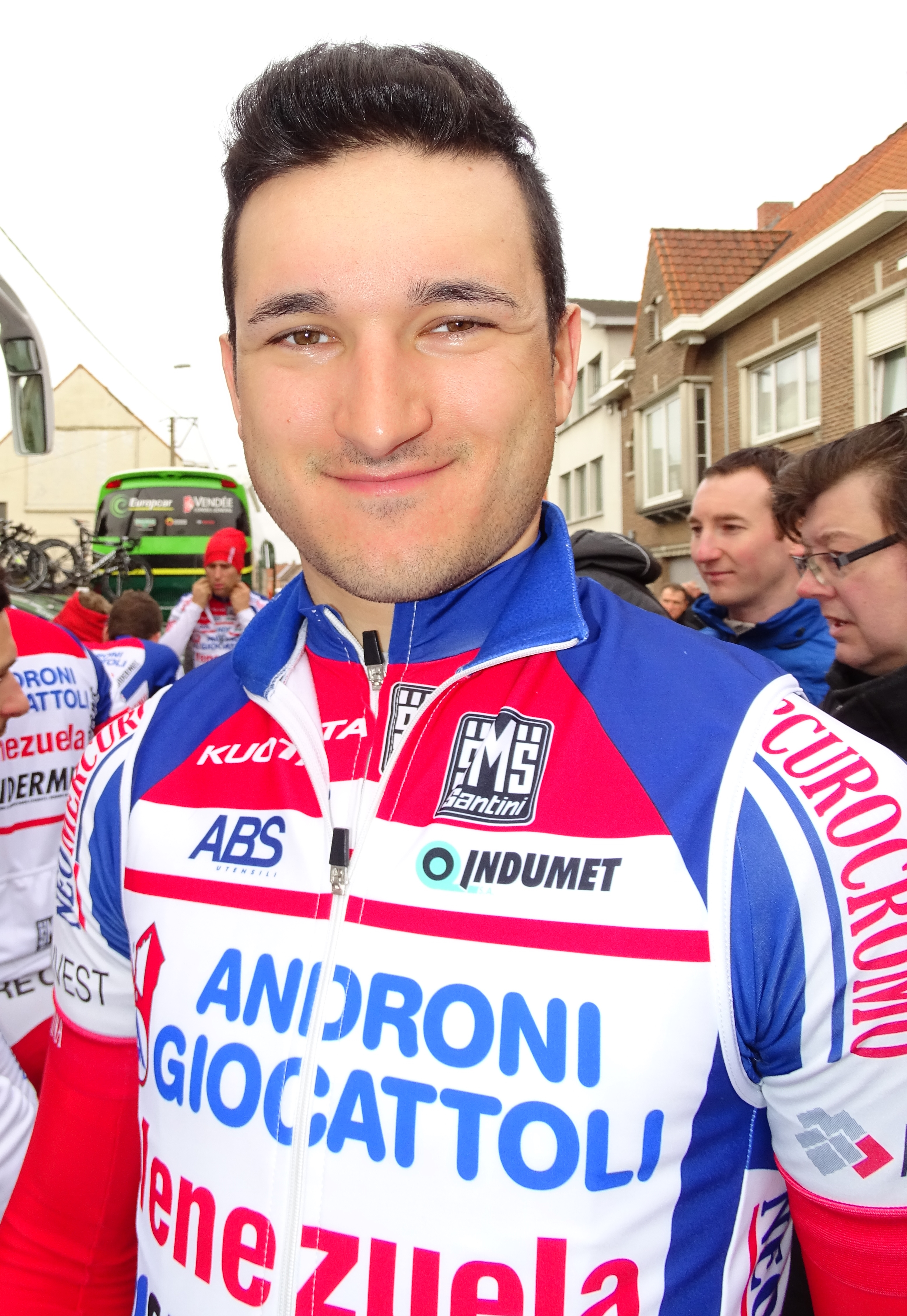 Reportage réalisé le vendredi 27 mars à l'occasion du départ et de l'arrivée du Grand Prix E3 2015 à Harelbeke, Belgique.